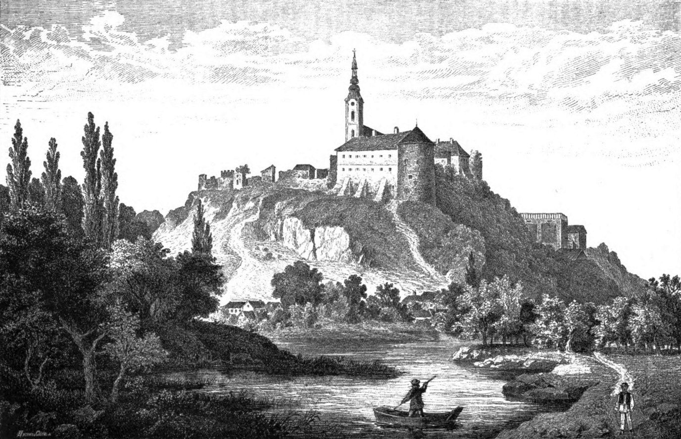 Iločka gradina